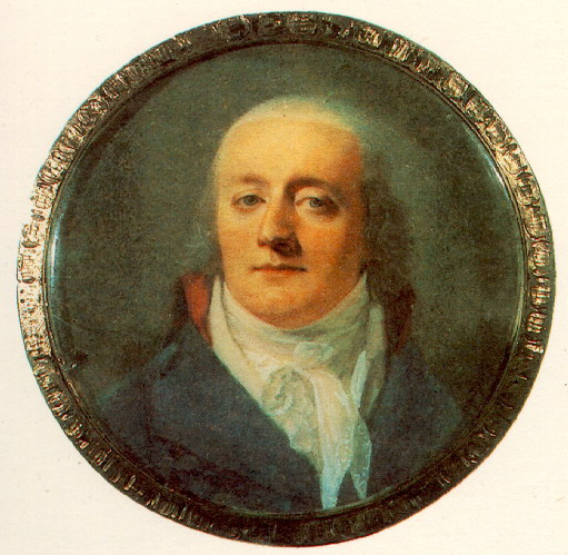 (Ivan Matveevich?) Muraviev.